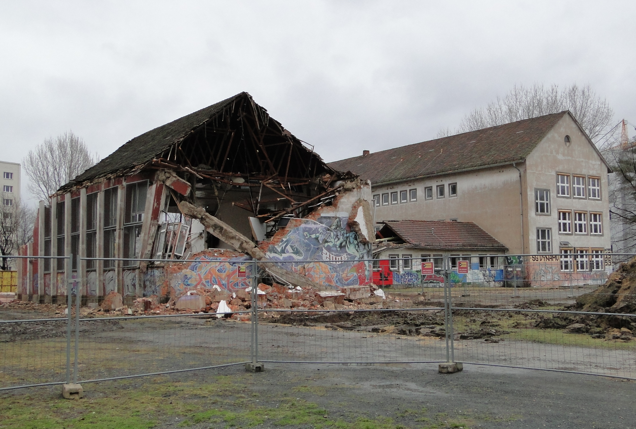 Abriss von Turnhalle und Verbindungsbau des Marie-Curie-Gymnasiums Dresden im März 2012